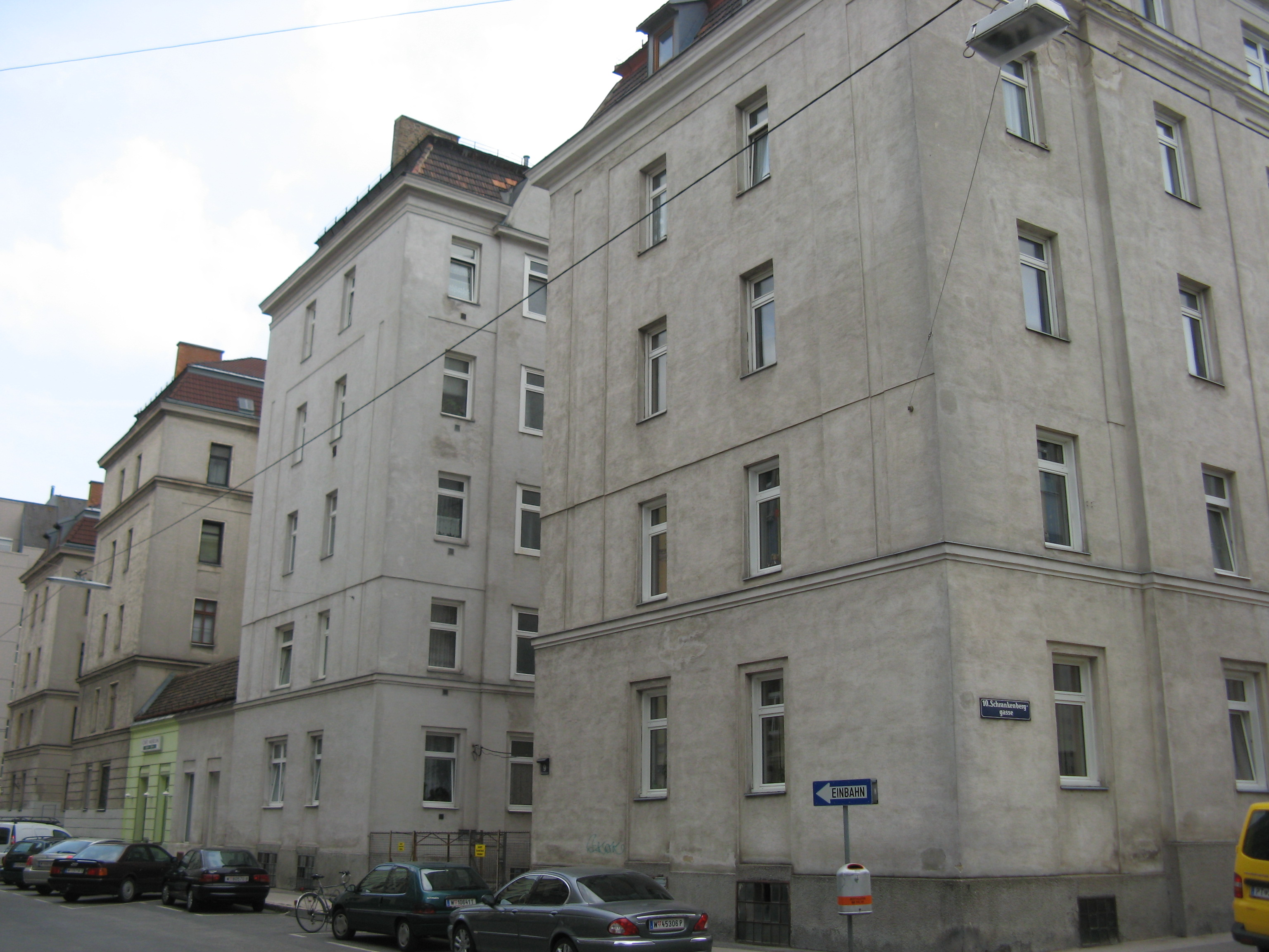 Kleinwohnungsanlage Buchengasse 7-9 (1912) von Otto Richter und Leopold Ramsauer, Wien-Favoriten